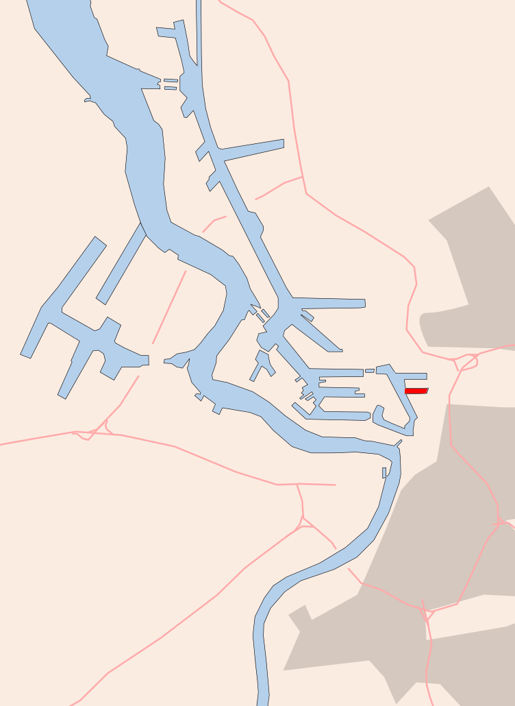 Antwerp , Tweede Havendok